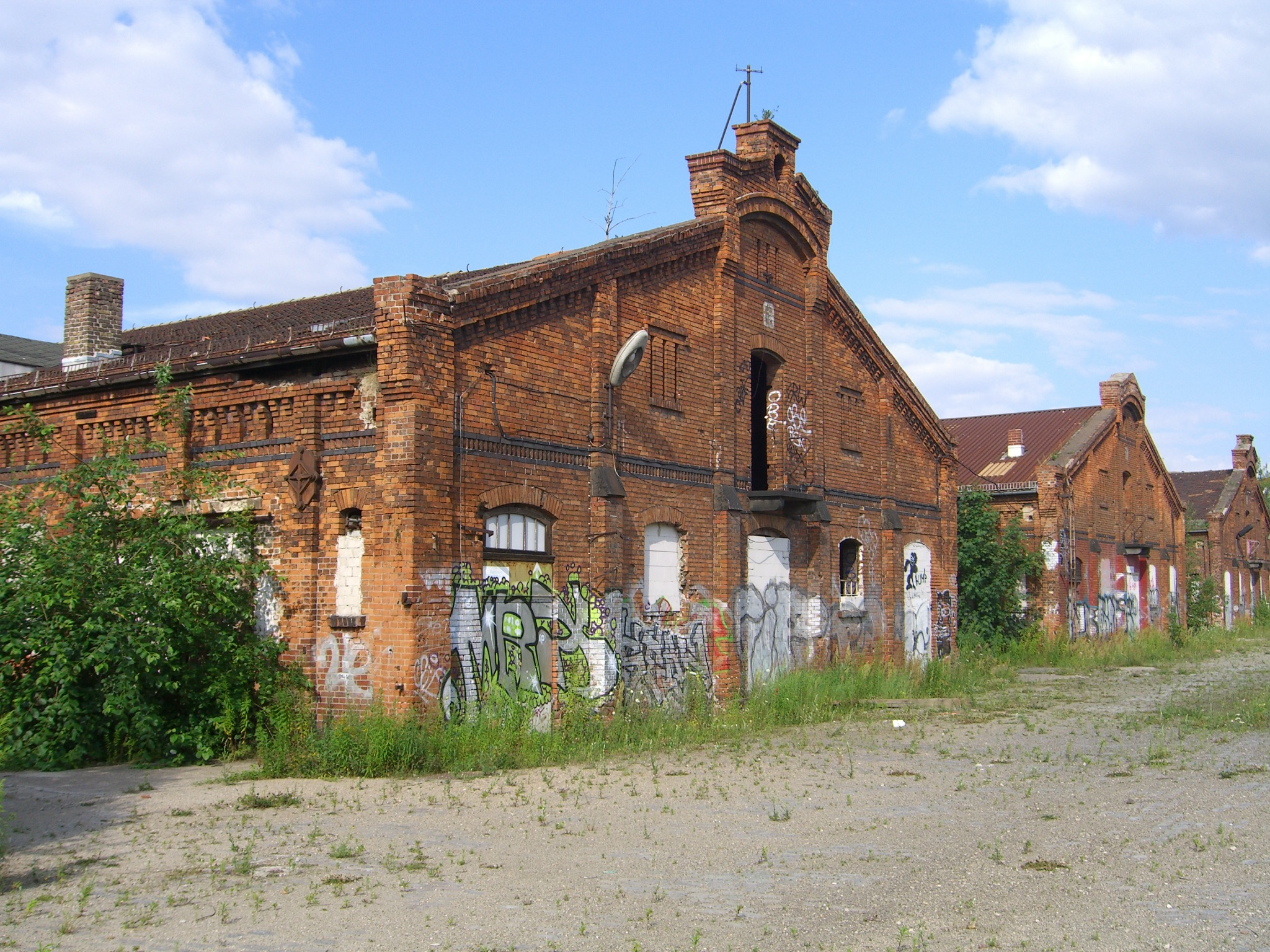 Rinderstall, Zentralvieh- und Schlachthof, Prenzlauer Berg, Berlin